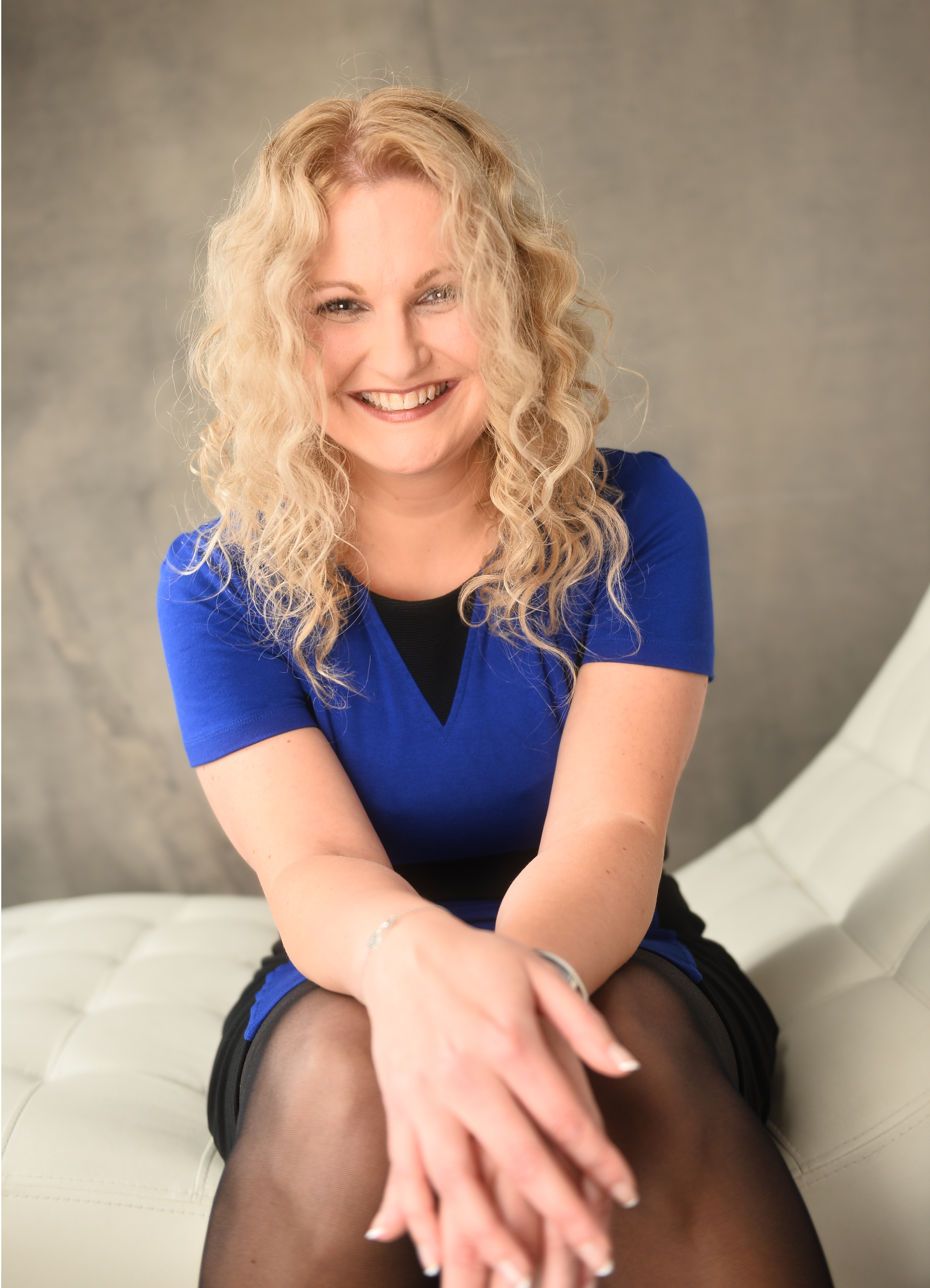 Nadja Hirsch, Coachoo GmbH